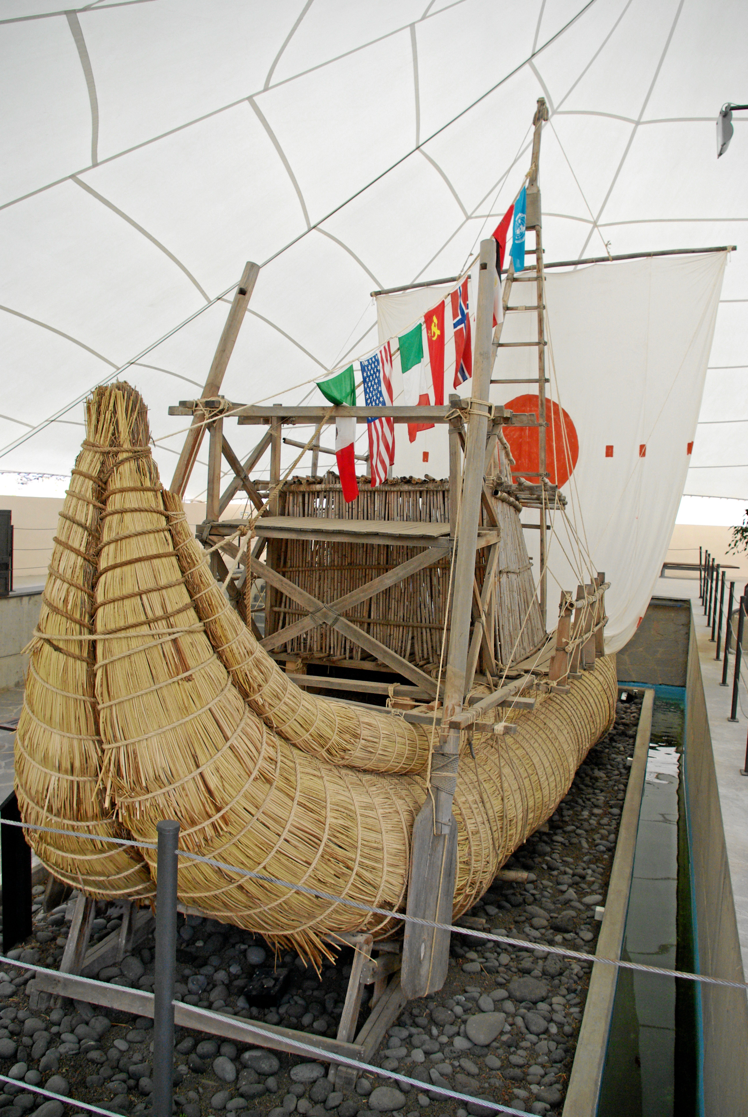 Schilfboot Ra II Nachbau in Güímar, Teneriffa